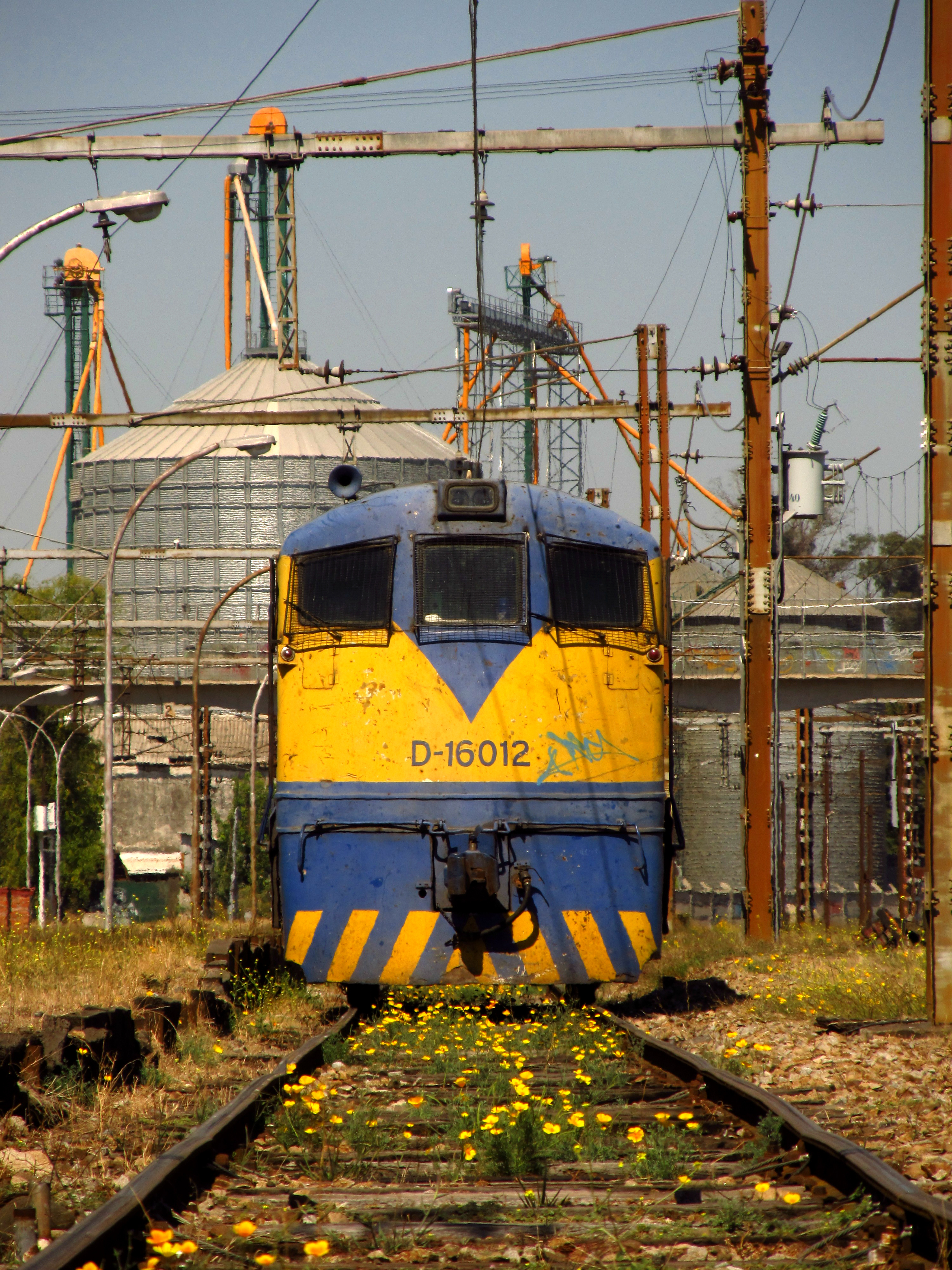 La locomotora D-16.012 de EFE en Chillán, después de llegar en la madrugada con el Tren de la Frontera desde Temuco